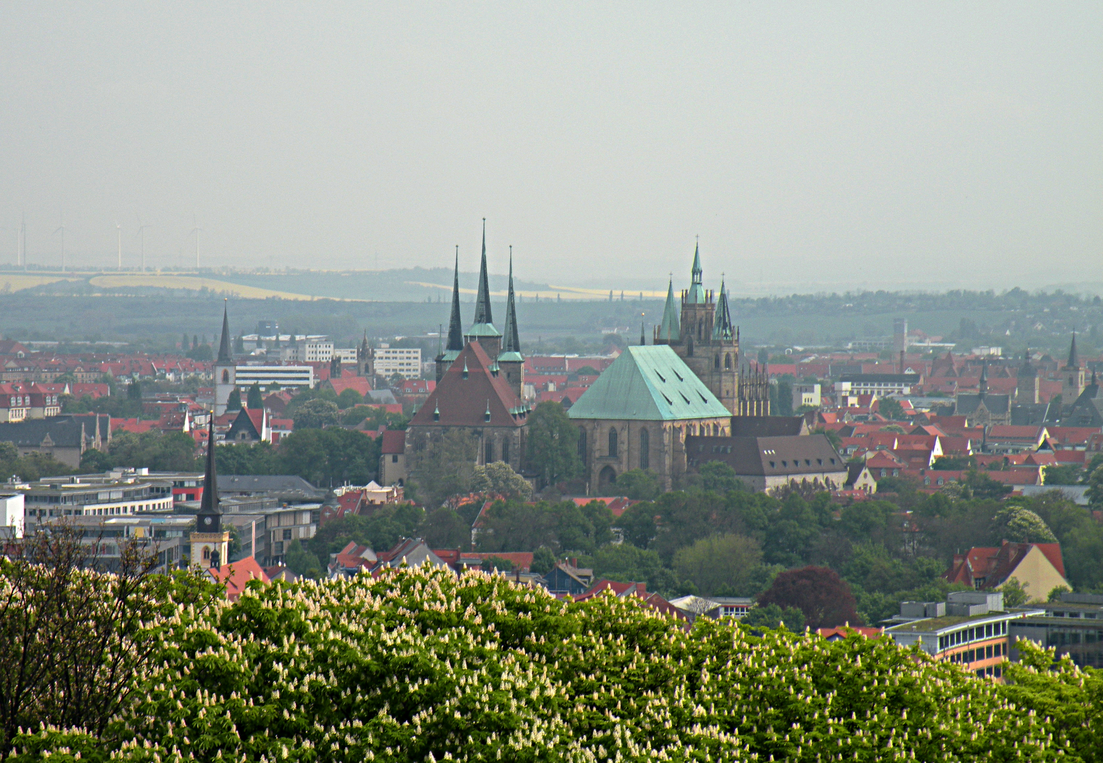 Вид на город со смотровой башни в эго-парке